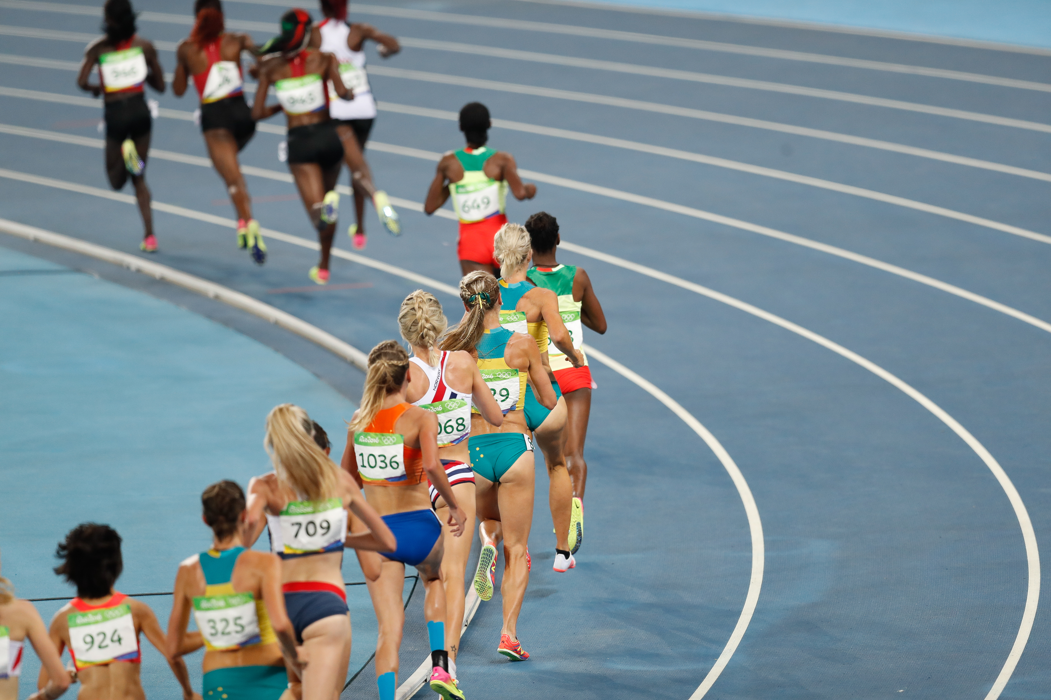 Rio de Janeiro - A queniana Vivian Jepkemoi Cheruiyot vence final e bate recorde olímpico dos 5 mil metros nos Jogos Rio 2016, no Estádio Olímpico (Fernando Frazão/Agência Brasil)